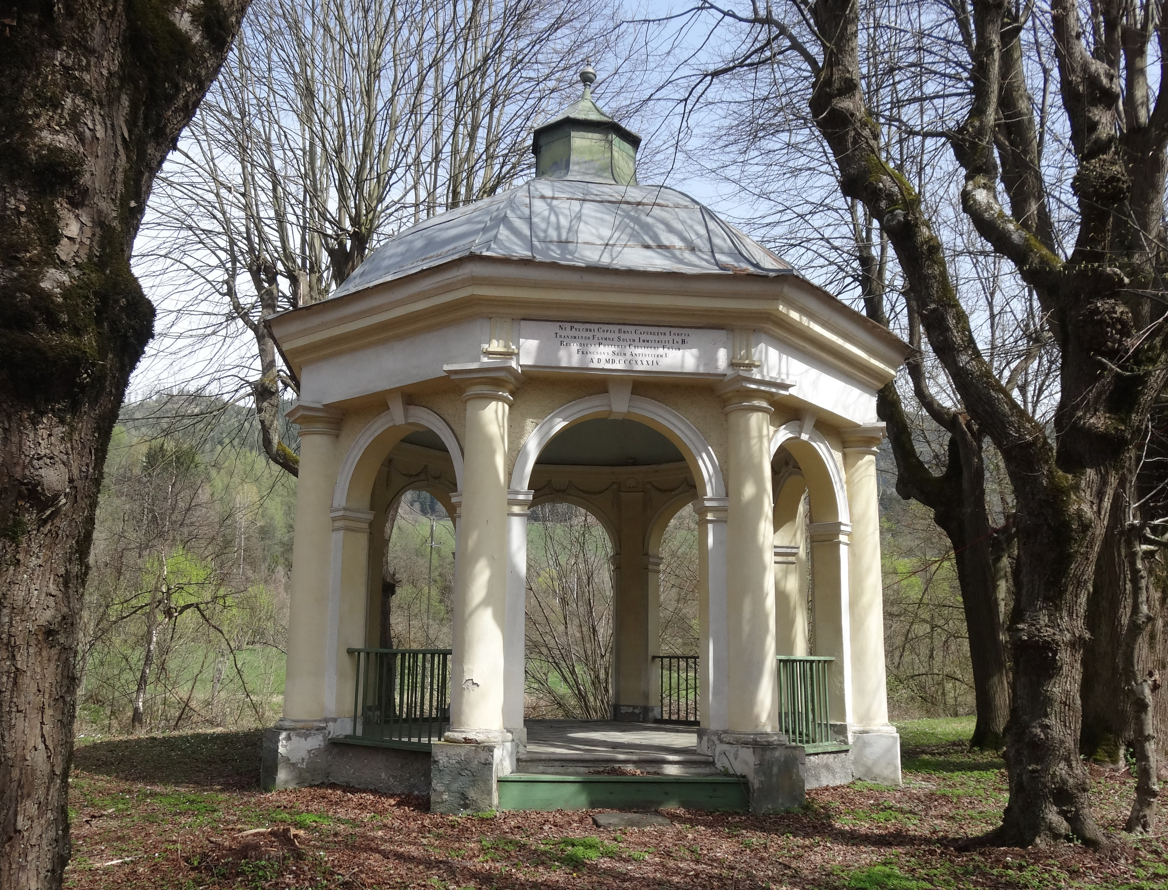 Der Monopteros im Park von Schloss Pöckstein